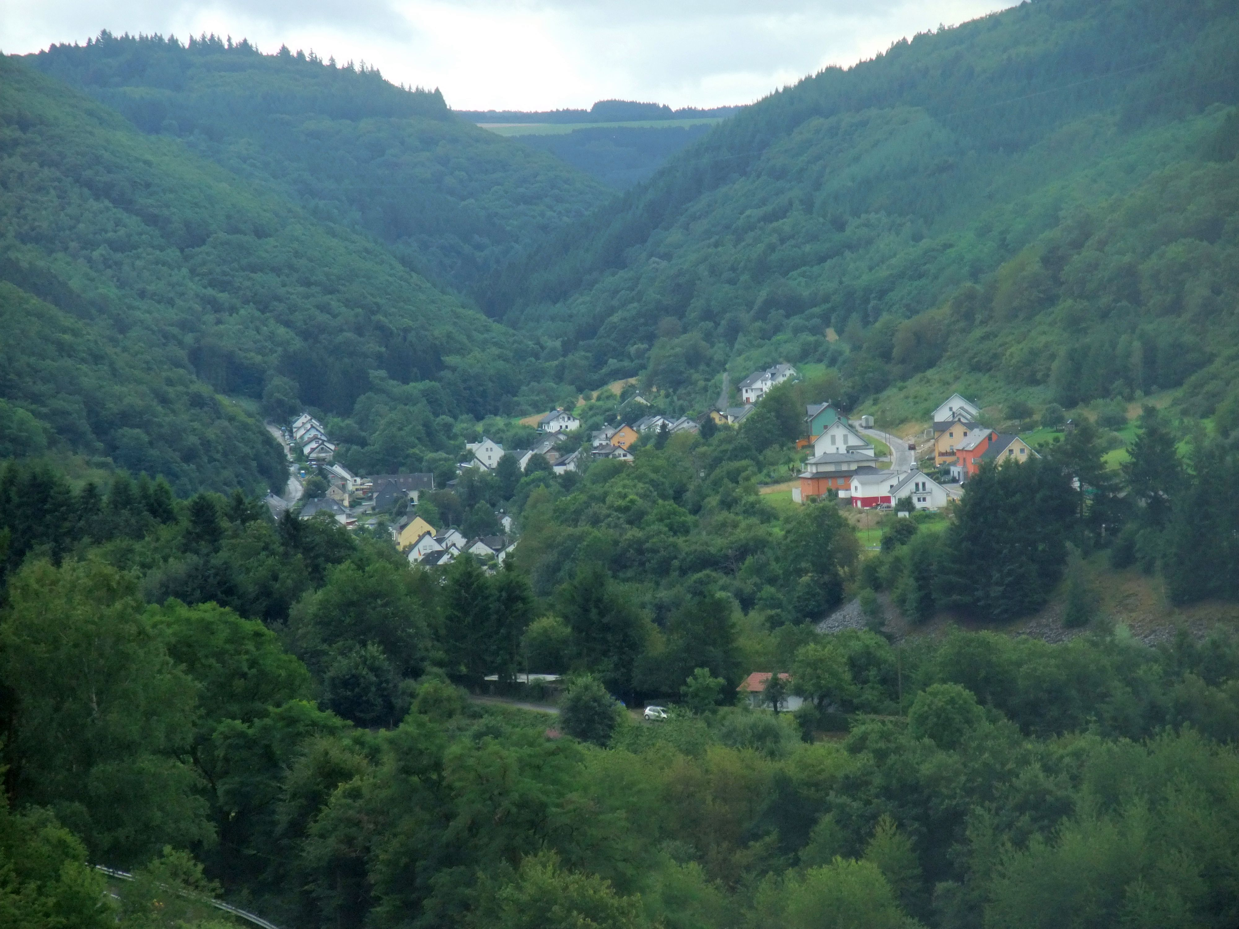 Riveris